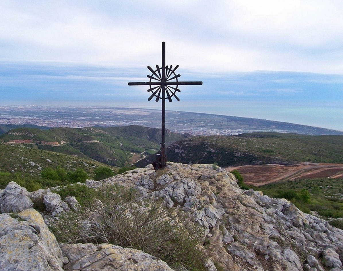 Creu del cim de La Morella